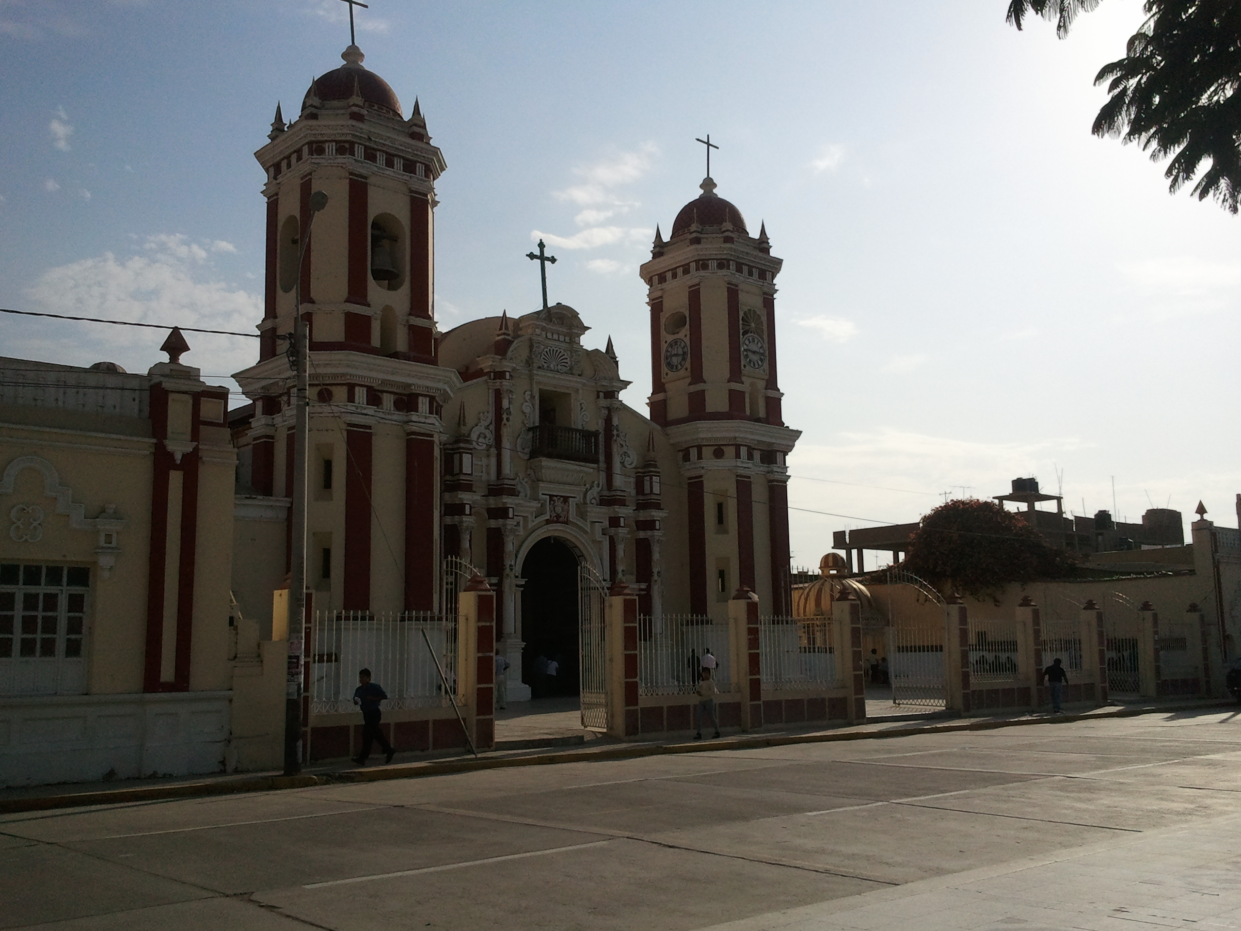 Vista actual de la Iglesia Colonial Santa Lucía de Ferreñafe